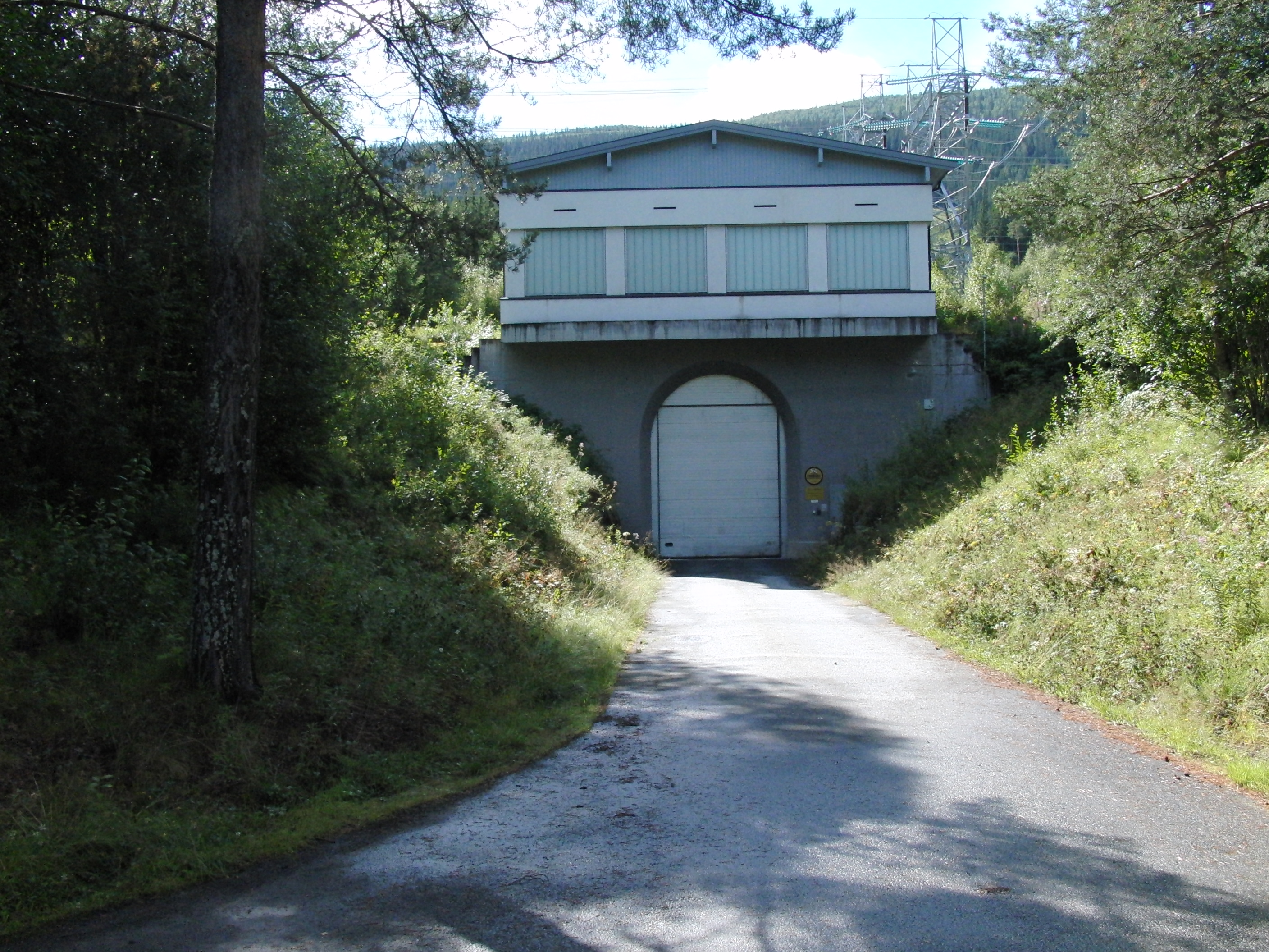 Usta kraftverk